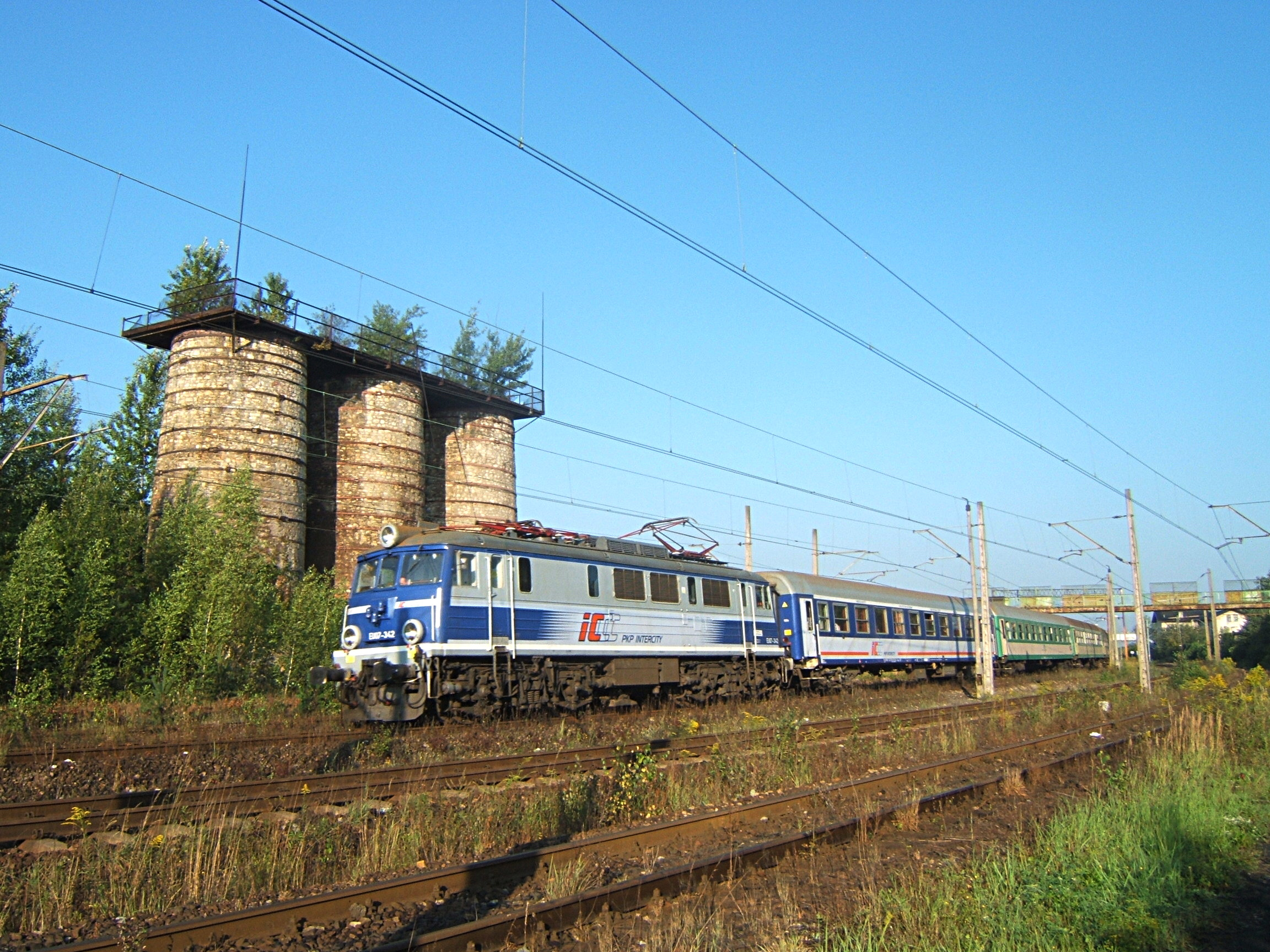 Lokomotywa EU07-342 należąca do PKP InterCity.